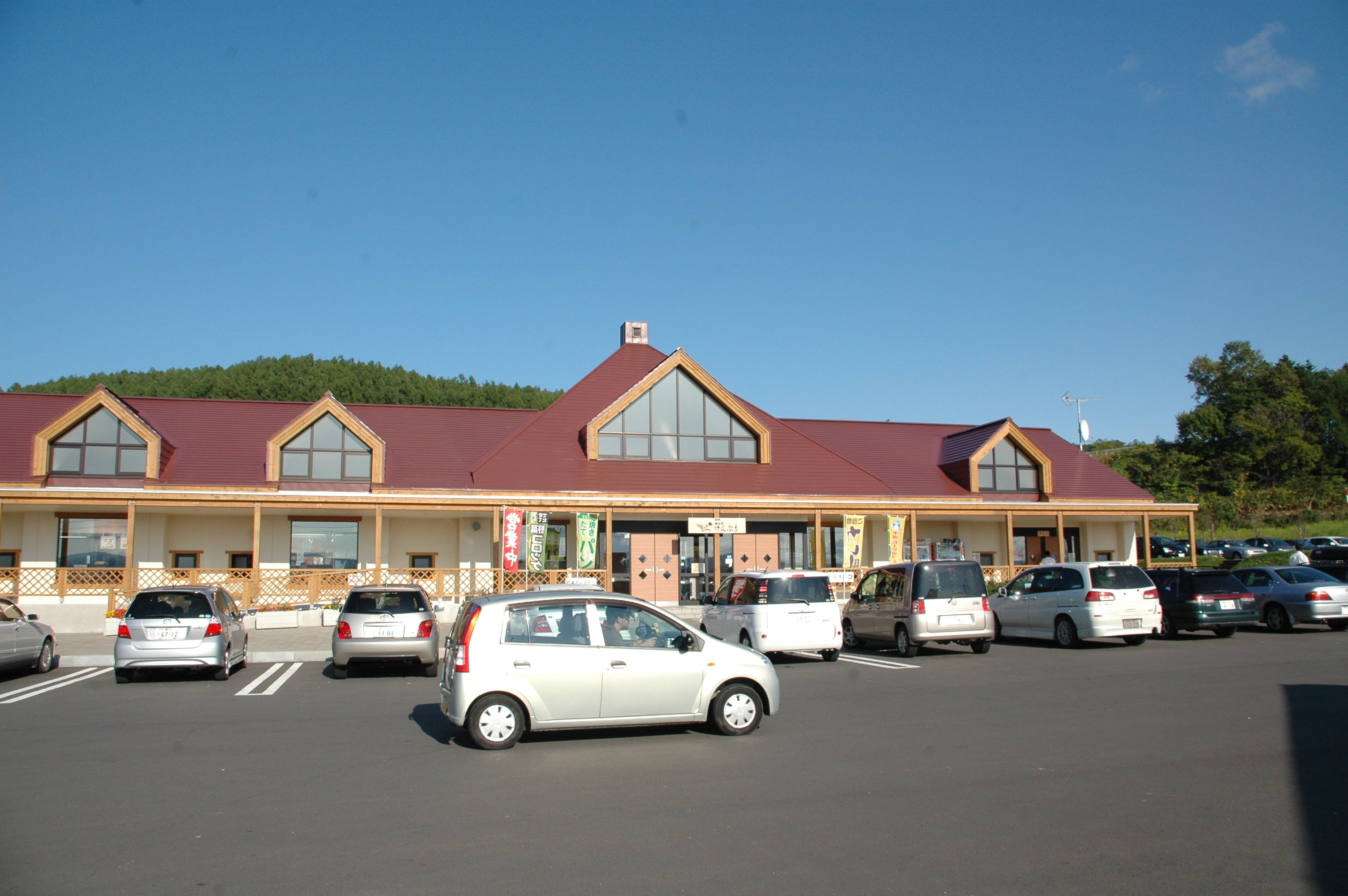 Ehonnosato Kenbuchi, Michinoeki, Hokkaido, Japan